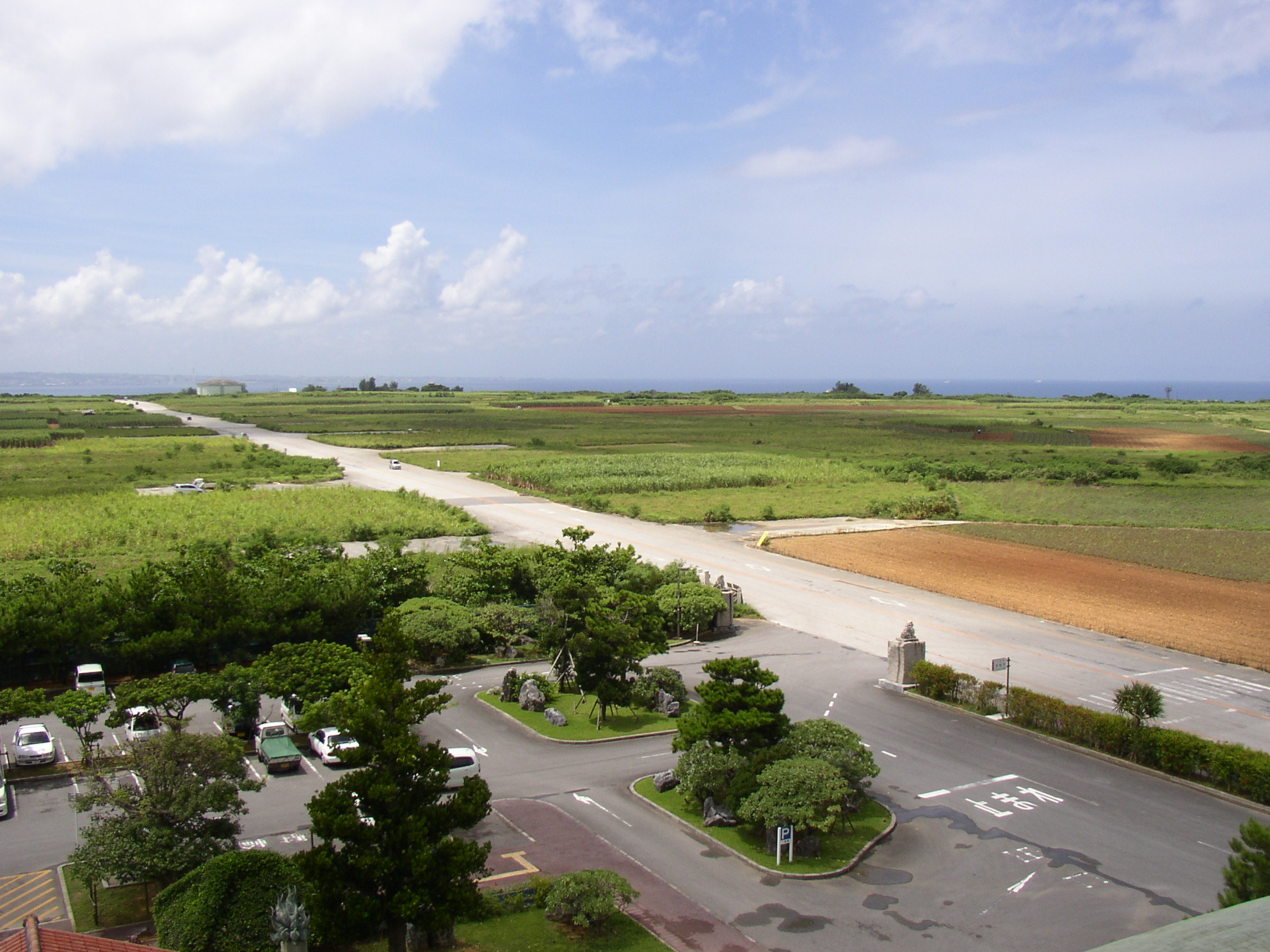 読谷補助飛行場（2006年）、読谷村役場より